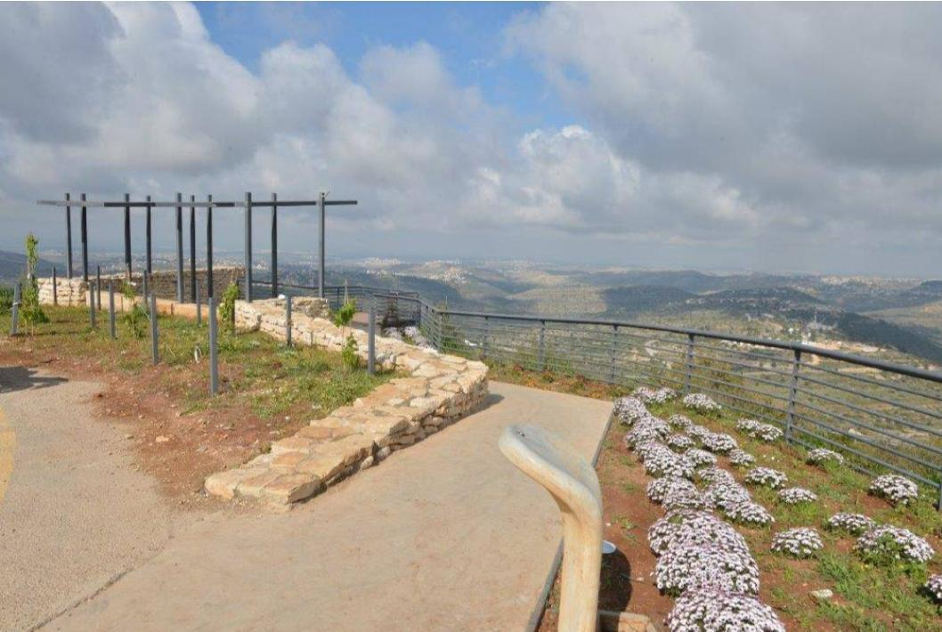 נוף הרי בנימין כפי שנשקף מהאתר 'תצפית גג הארץ' ביישוב חרשה.